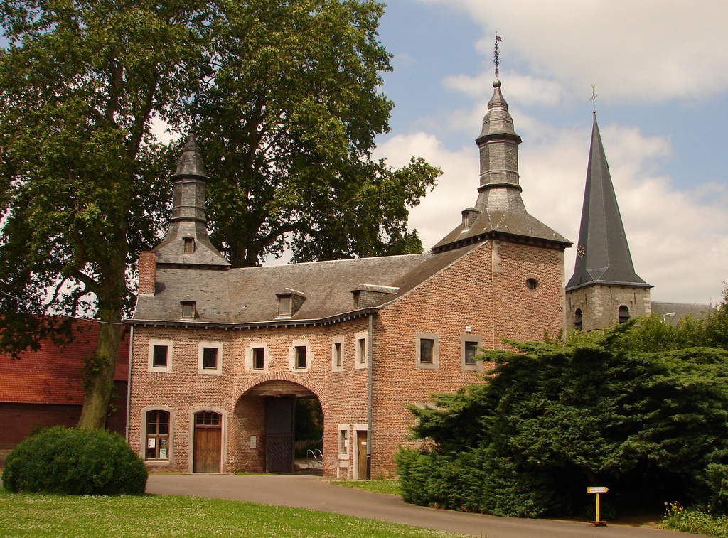 De poort van het kasteel van Hoepertingen